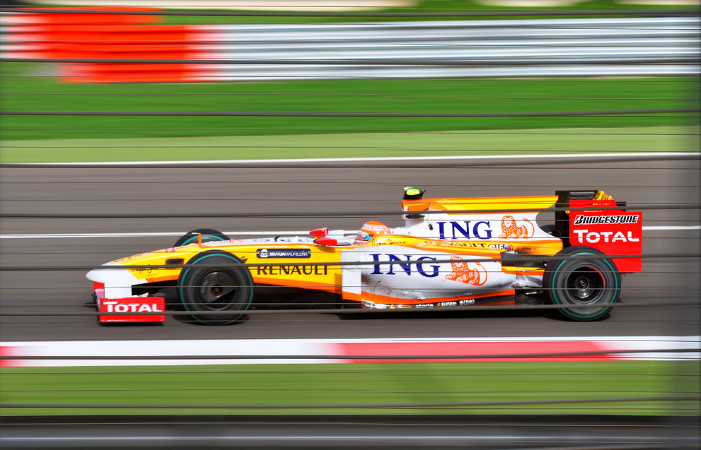 GP de Bahrein 2009 Renault R29